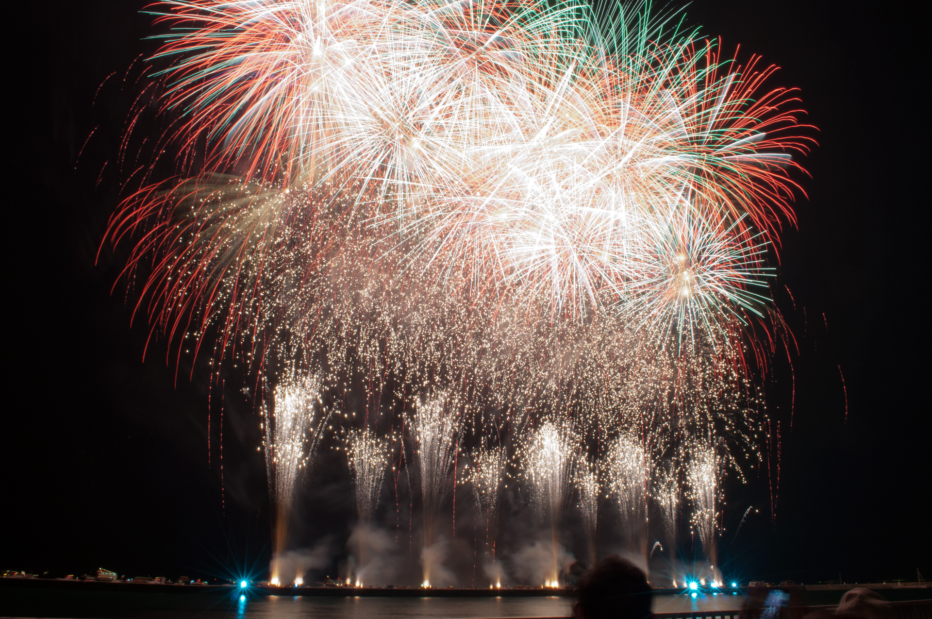 おんまくの花火大会(今治市）